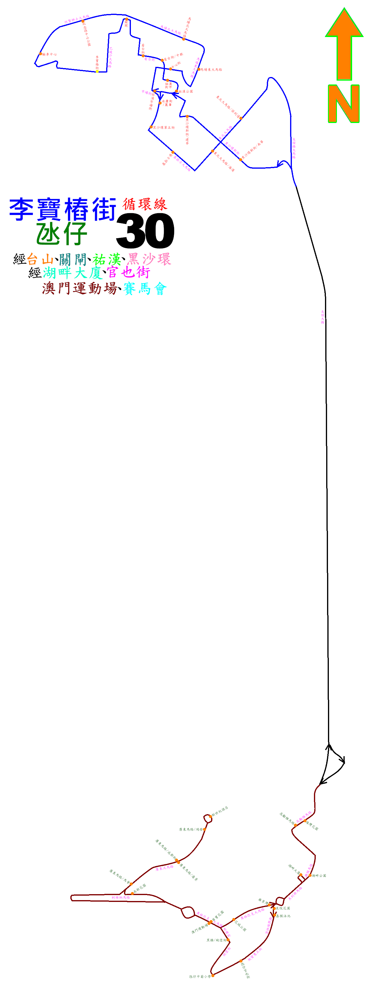 中文（香港）: 澳門巴士30號線的走線圖